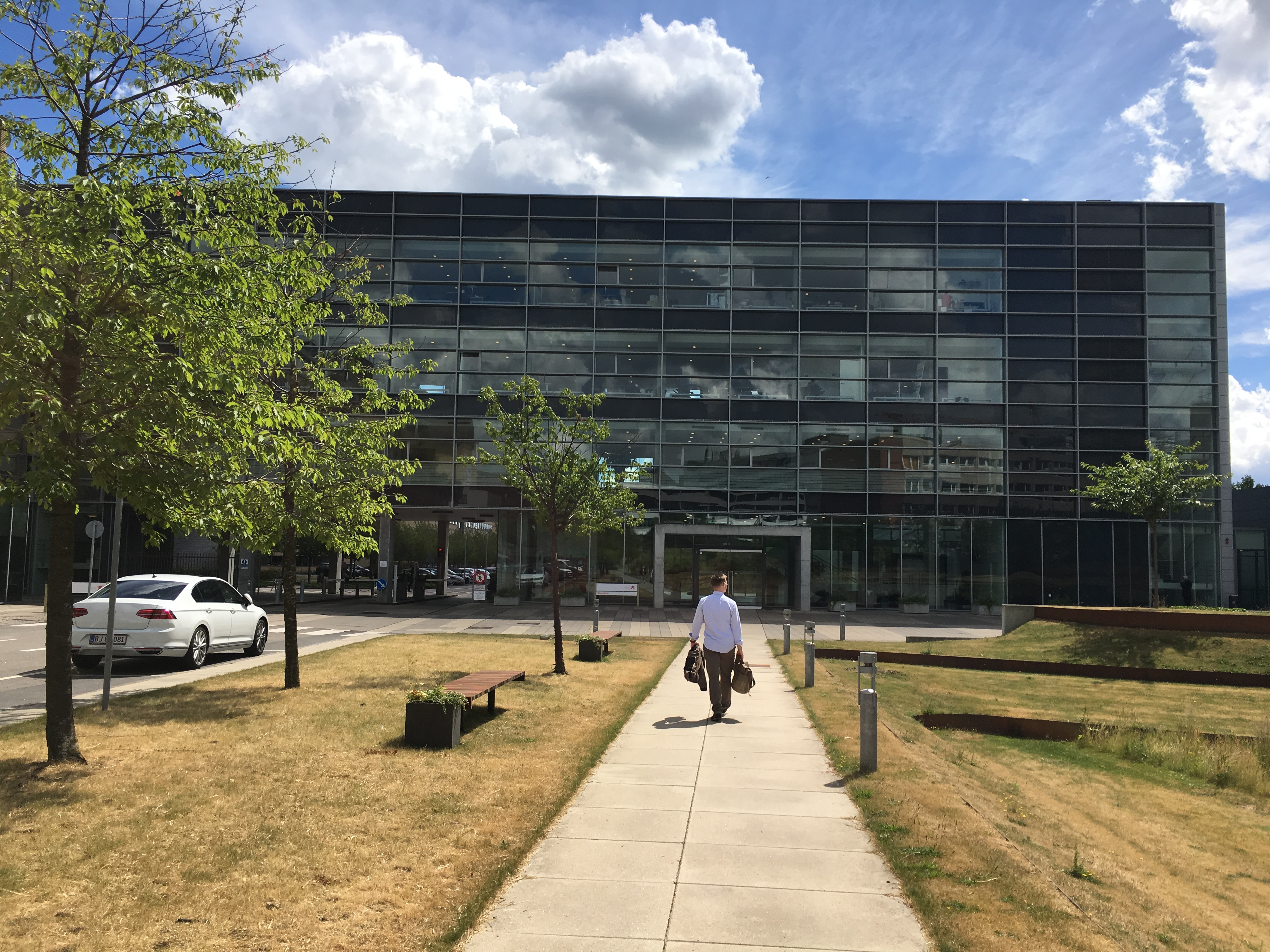 Indgangsbygningen til Lundbeck på Ottiliavej, Velaby